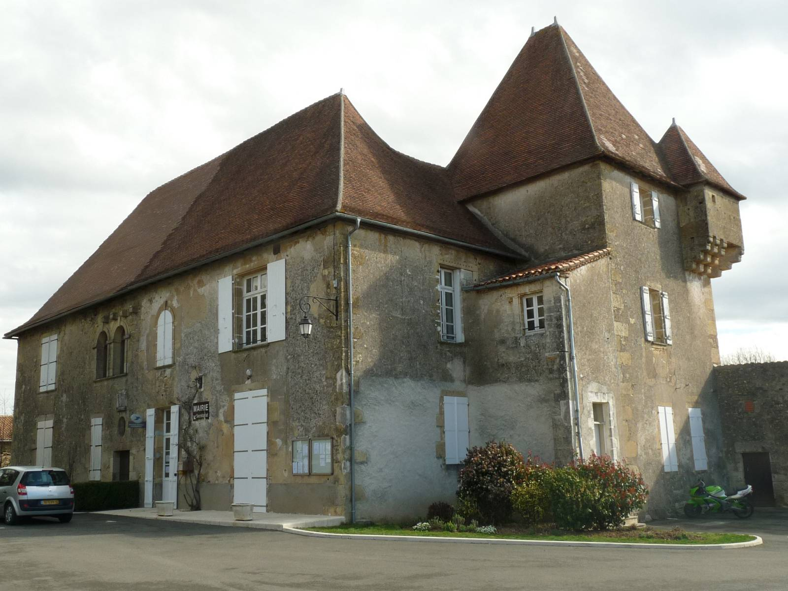 mairie de Suaux, Charente, France